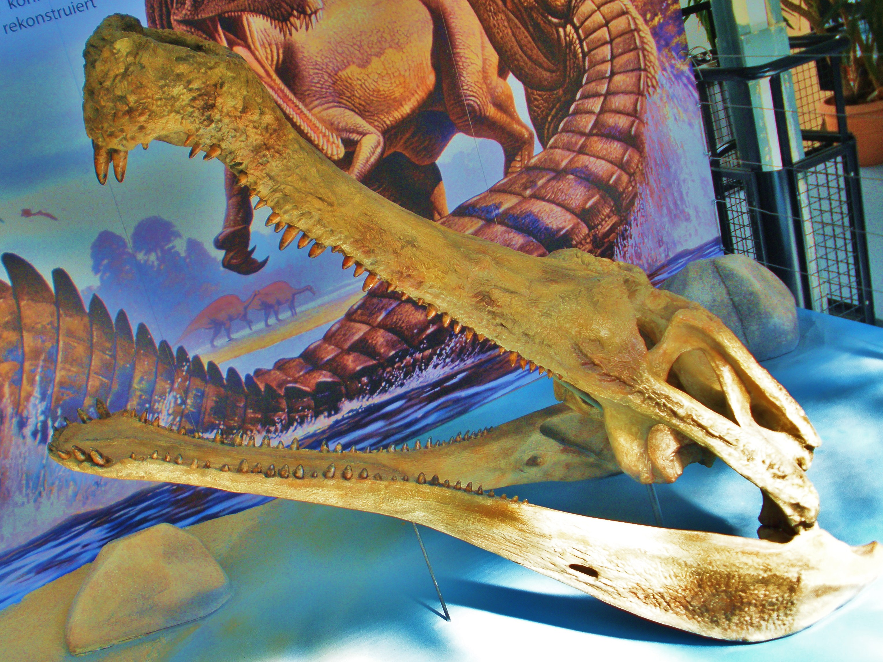 Sarcosuchus